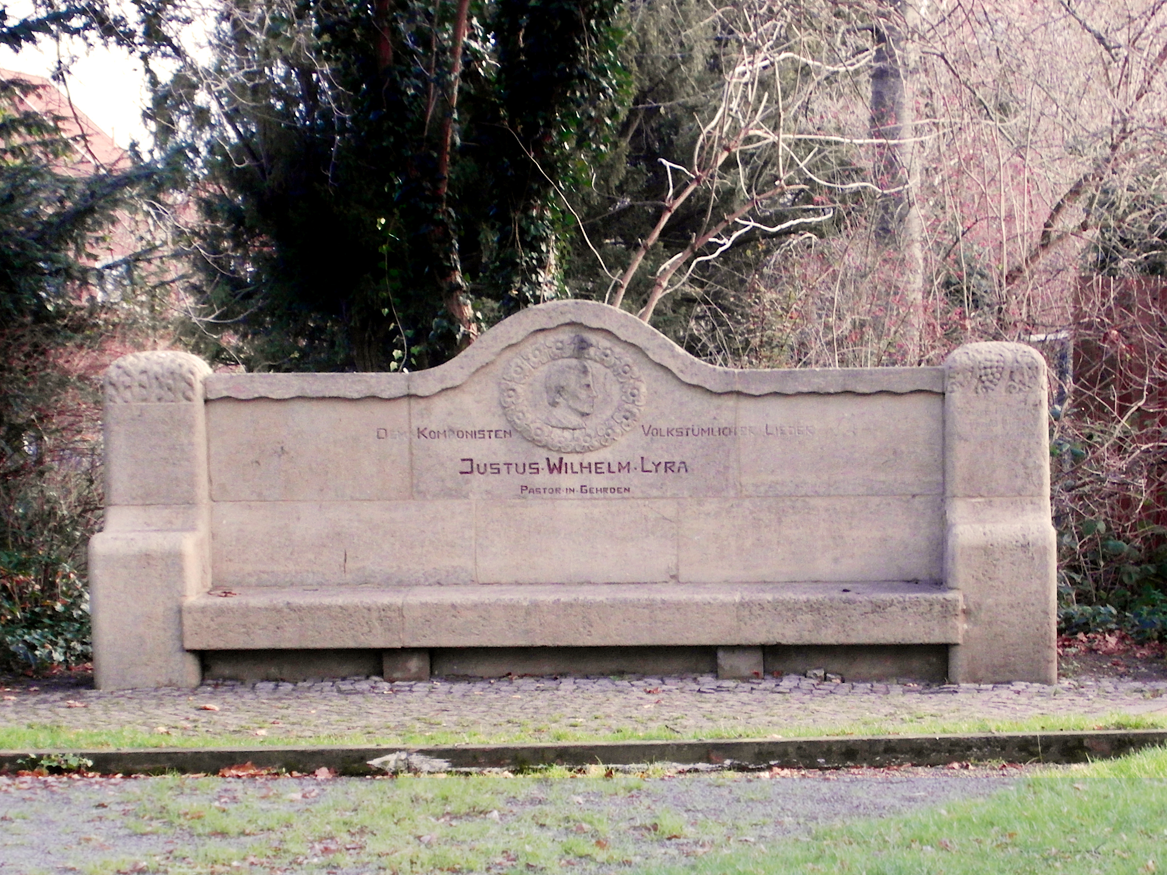 Die Lyrabank auf dem Kirchhof Gehrden